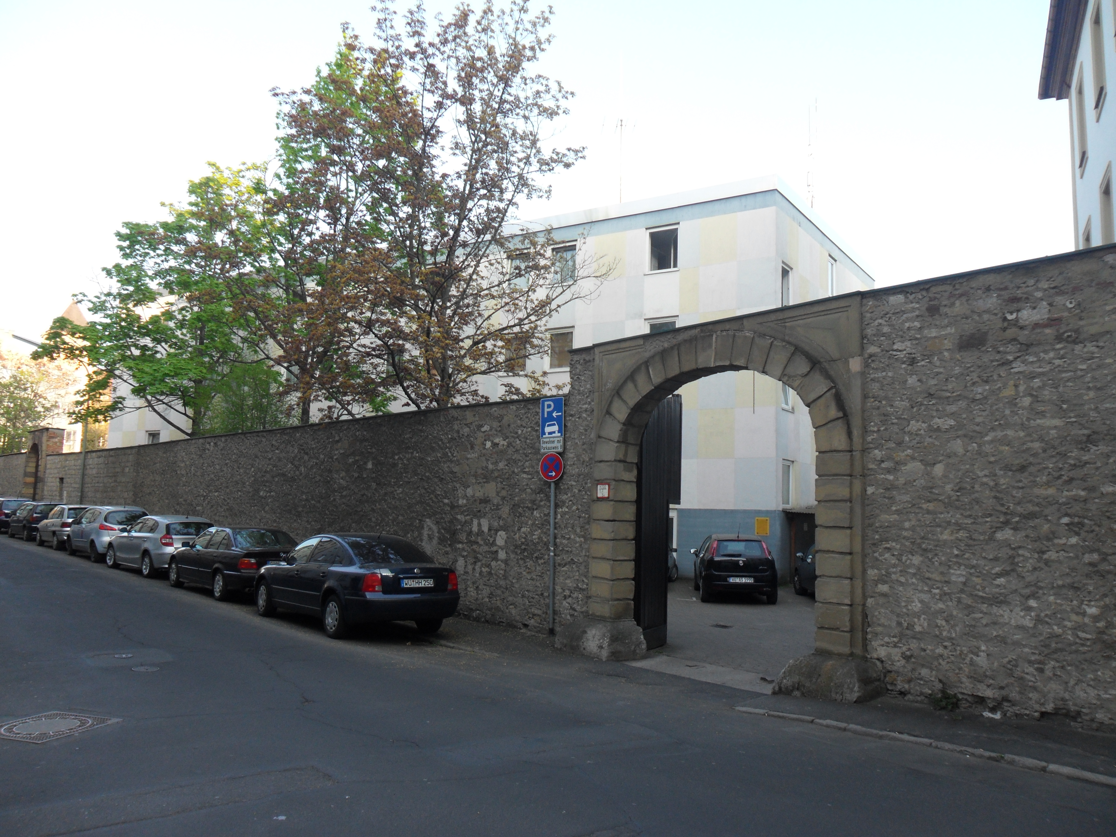 Siehe Bildtitel